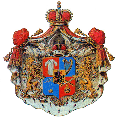 Герб светлейших князей Грузинских